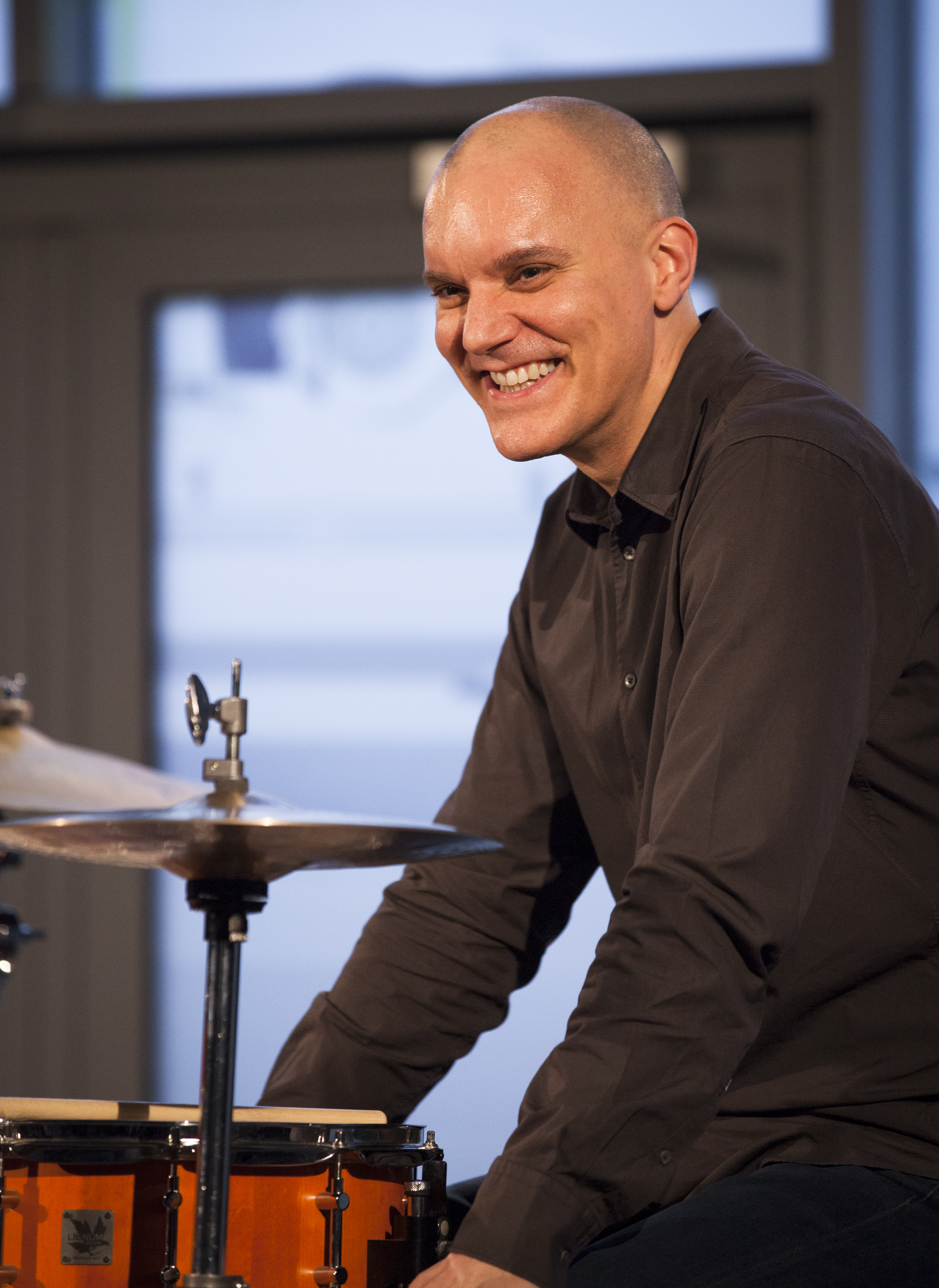 Stéphane Galland - © 7-5-11